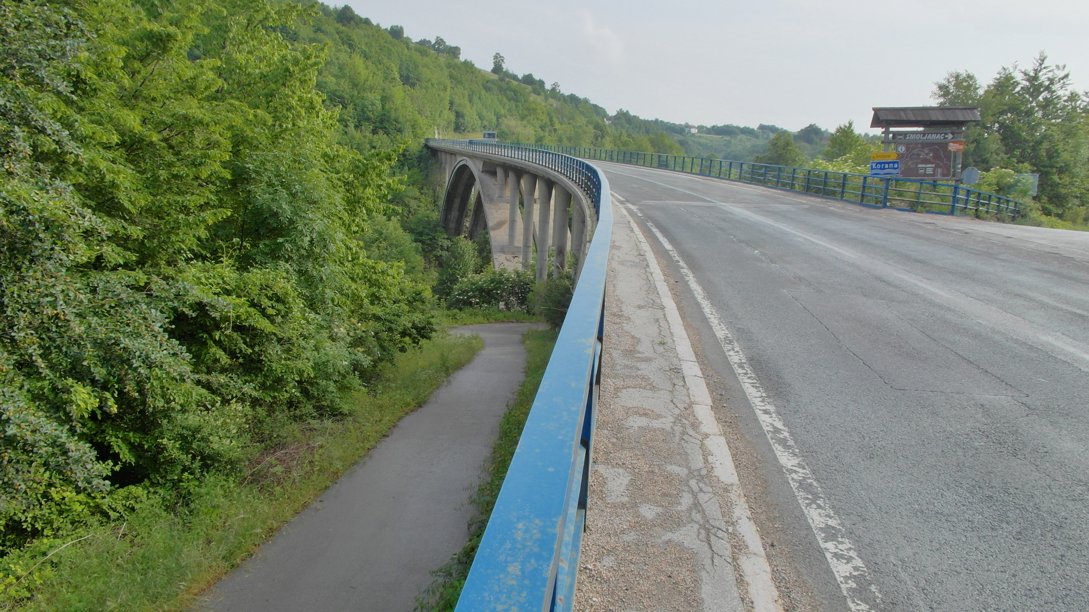 MOST PONAD RIEKU KORANA - BRIDGE OVER KORANA RIVER